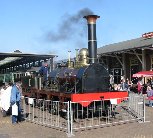 Replica van De Arend uit 1839 onder stoom (Foto: Hans de Kroon) Categorie:Afbeelding Nederlands spoorwegmaterieel